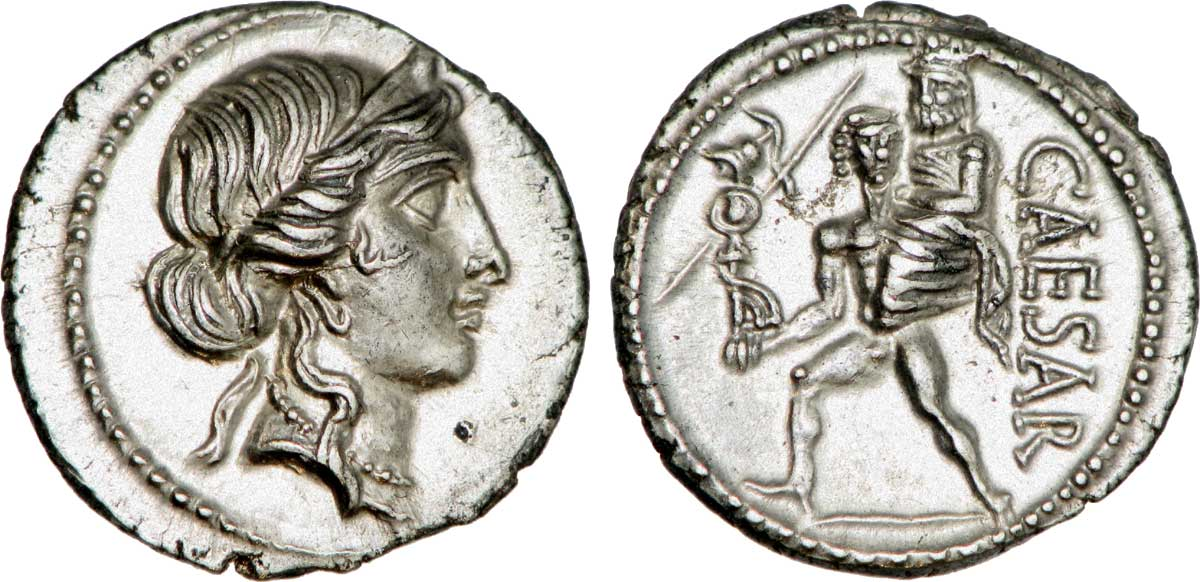 Nāhuatl: Denier frappé sous César célébrant le mythe d'Enée et d'Anchise Description revers : Énée nu marchant à gauche, tenant de la main droite le palladium et portant, sur son épaule, son père Anchise .